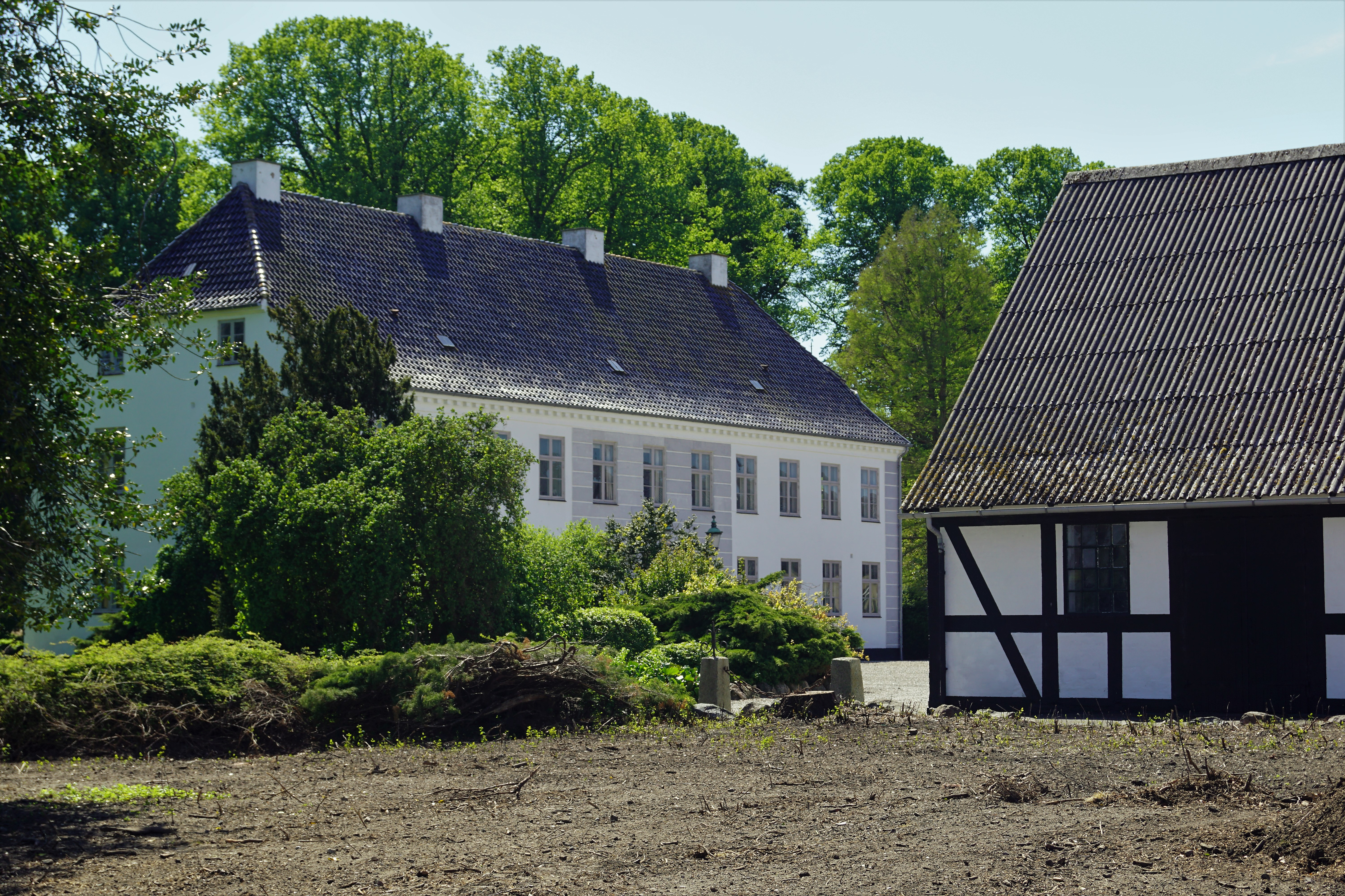 Tårnholm ved Korsør Nor